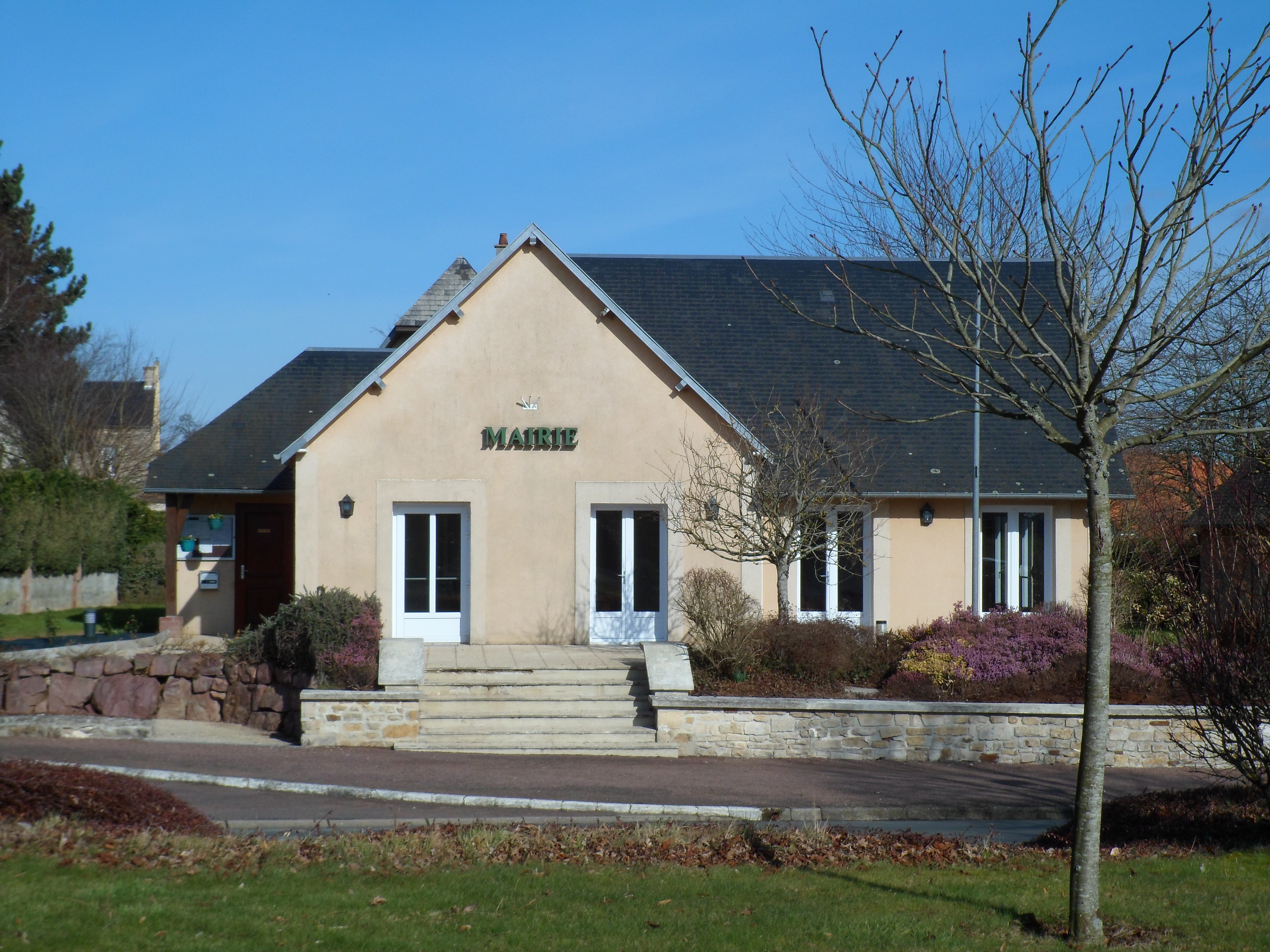 Missy